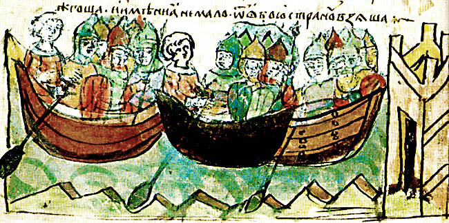 Radzivill chronicle. Knyaz Igor campaign in 941. Поход князя Игоря на Царьград в 941. Стр. 21 об.